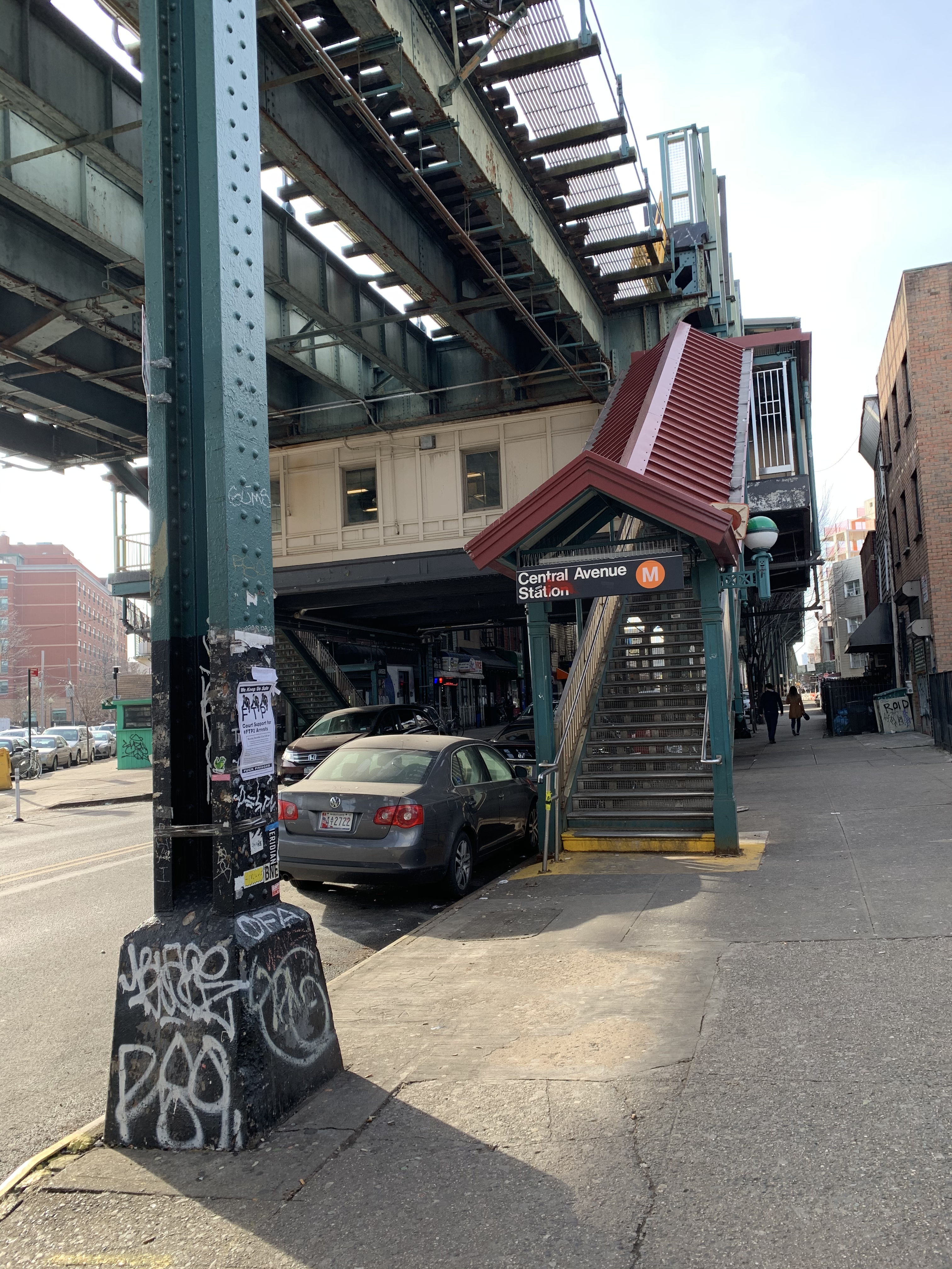 Brooklyn